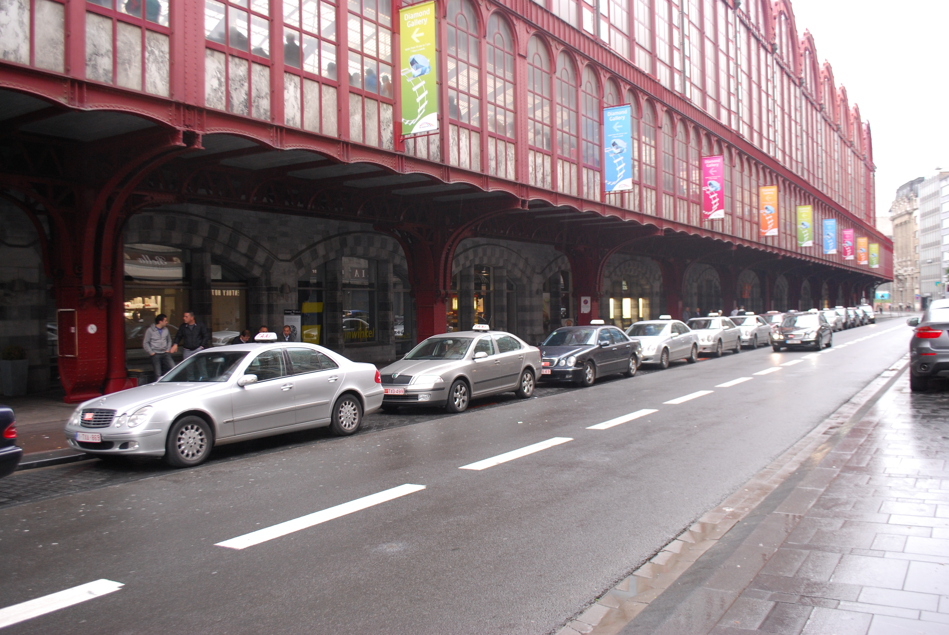 Vue de Pelikaanstraat à Anvers.